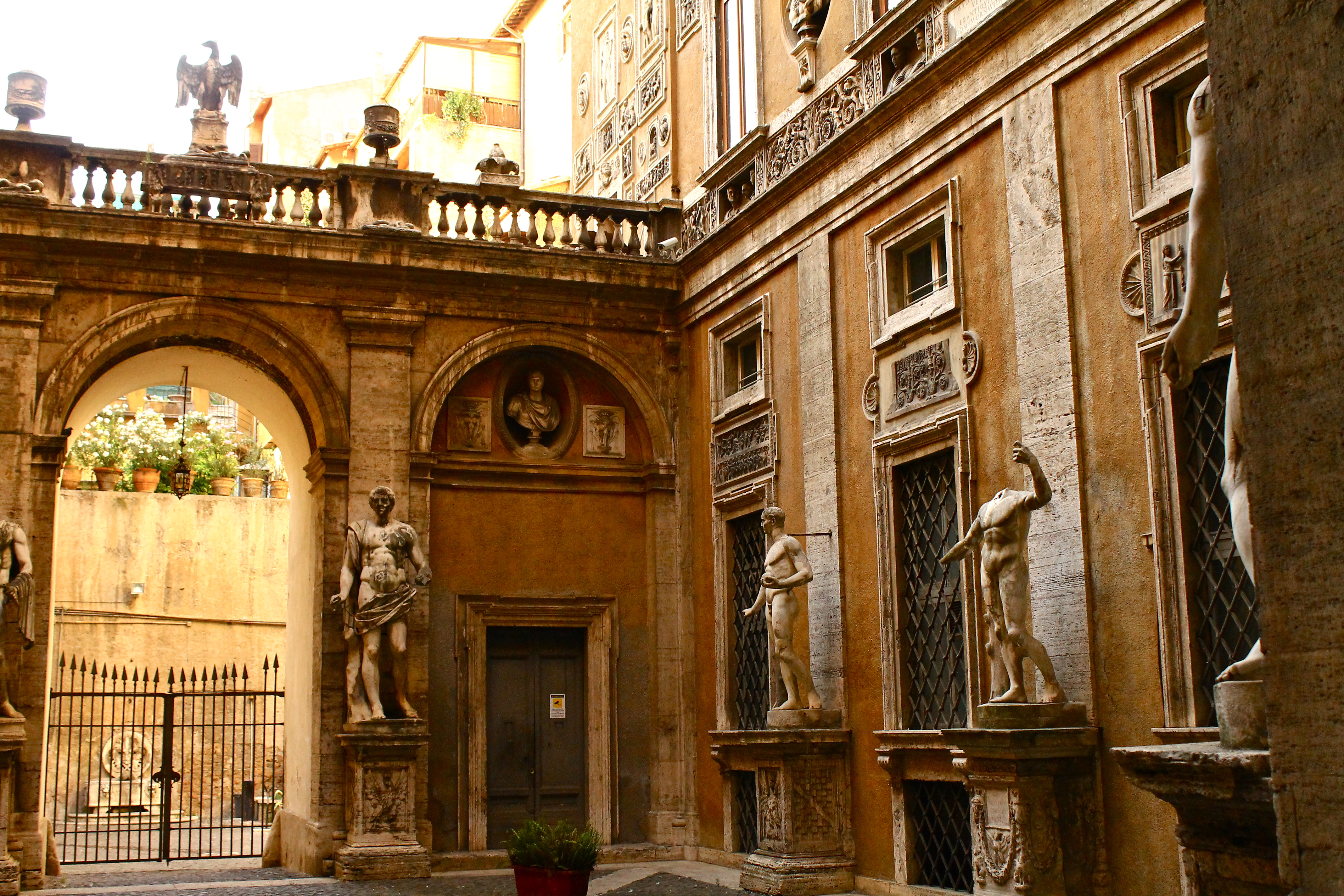 Biblioteca di Storia Moderna e Contemporanea - MIBAC This is a photo of a monument which is part of cultural heritage of Italy.